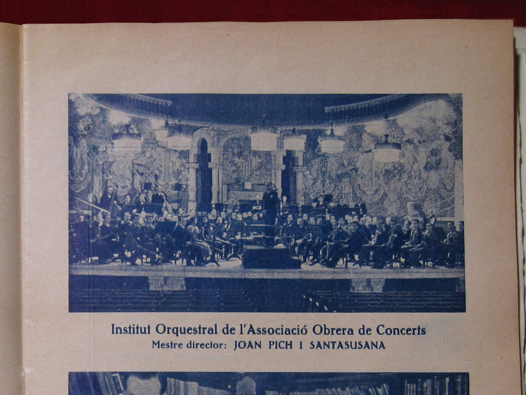 Reproducció de l'interior del programa del concert de presentació de l'Institut Orquestral de l'Associació Obrera de Concerts celebrat el dia 6 de maig de 1934 al Palau de Projeccions de Montjuïc de Barcelona, sota la batuta de Joan Pich i Santasusana.Arxiu Família Pich Santasusana.